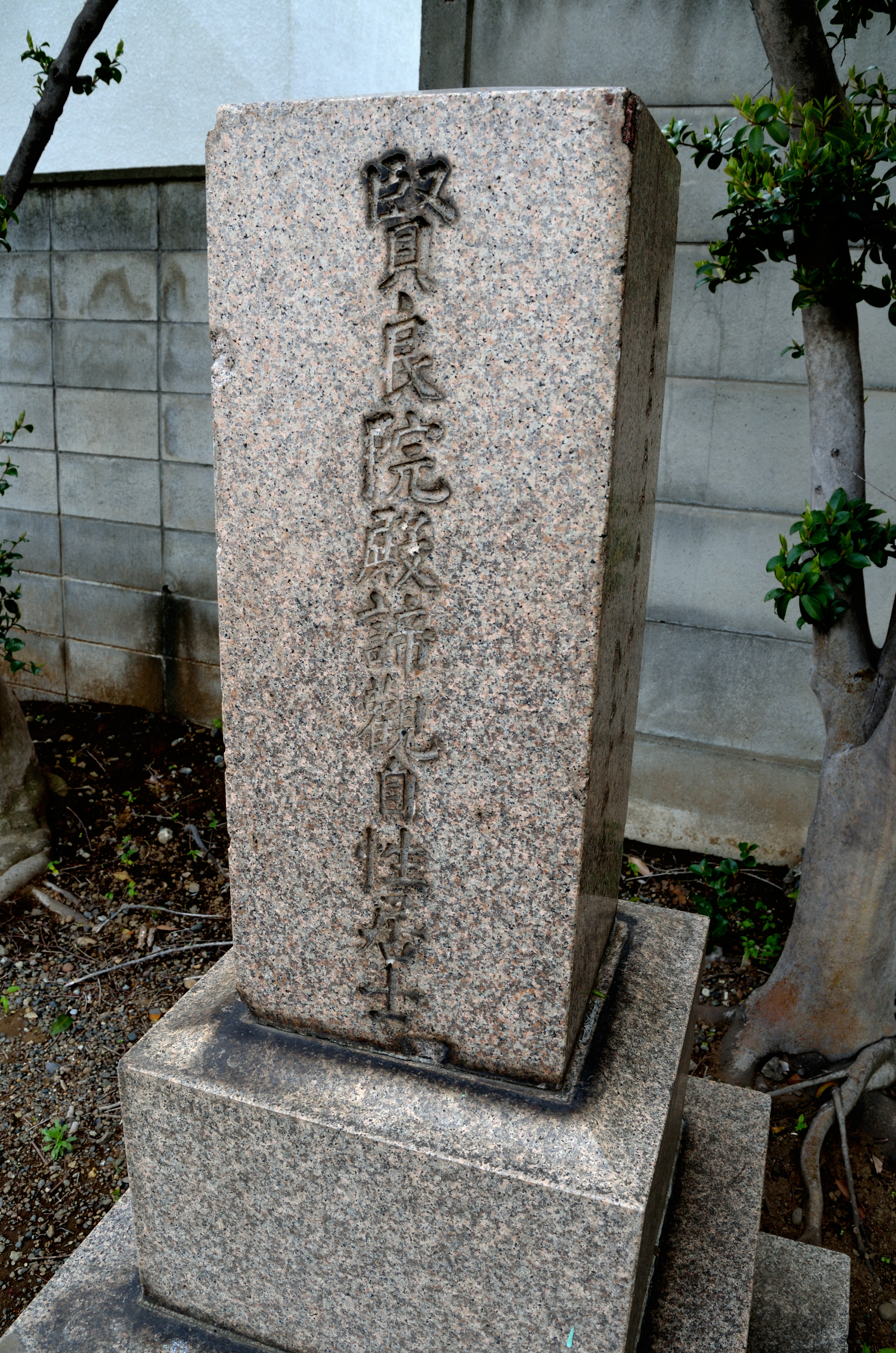 板垣退助の五男・乾六一（いぬい・むいち、1897-1918）の墓。東京都品川区北品川。